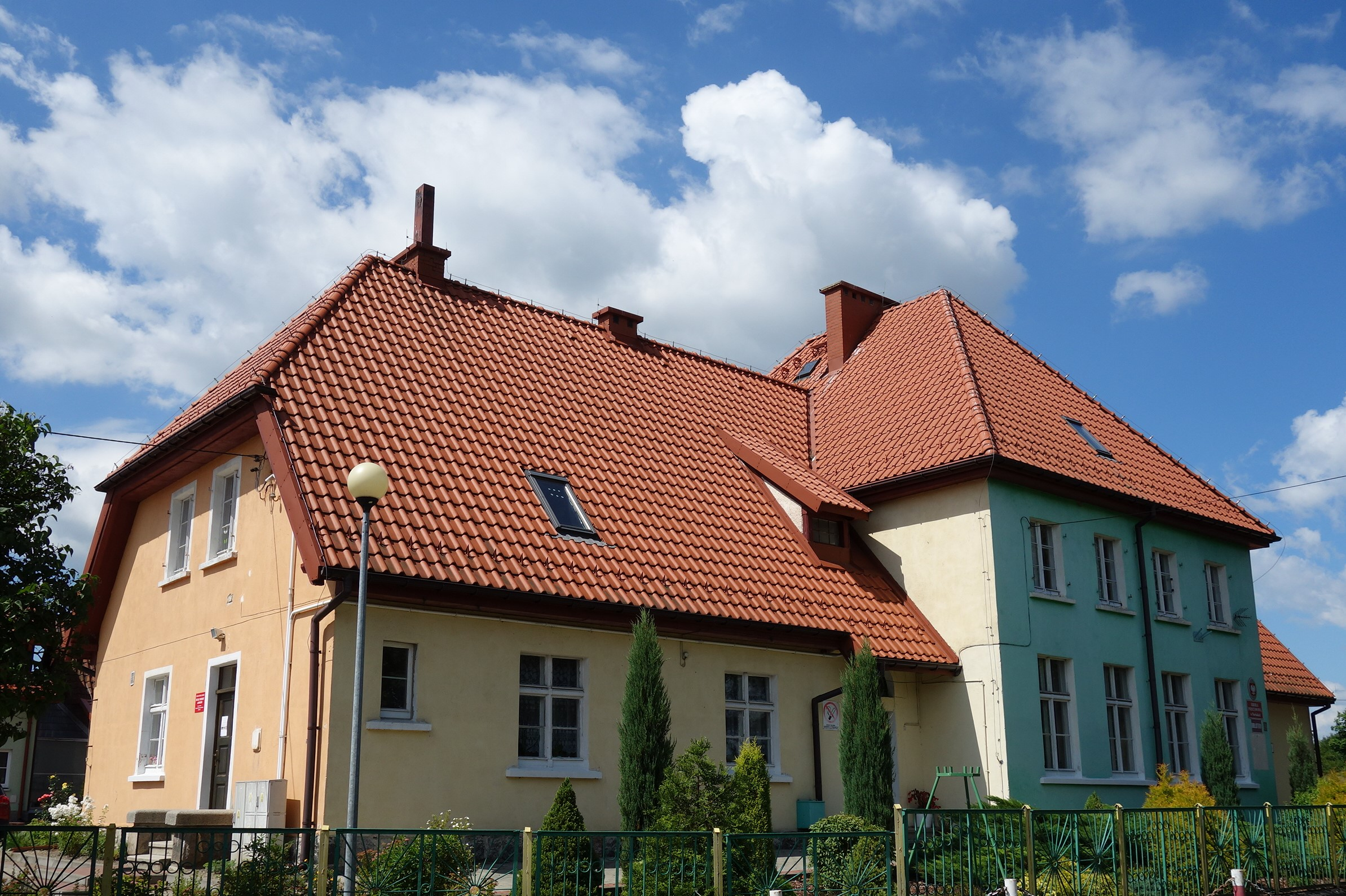 das alte deutsche Schulhaus, Grundsteinlegung 1913 im Jahre 2017